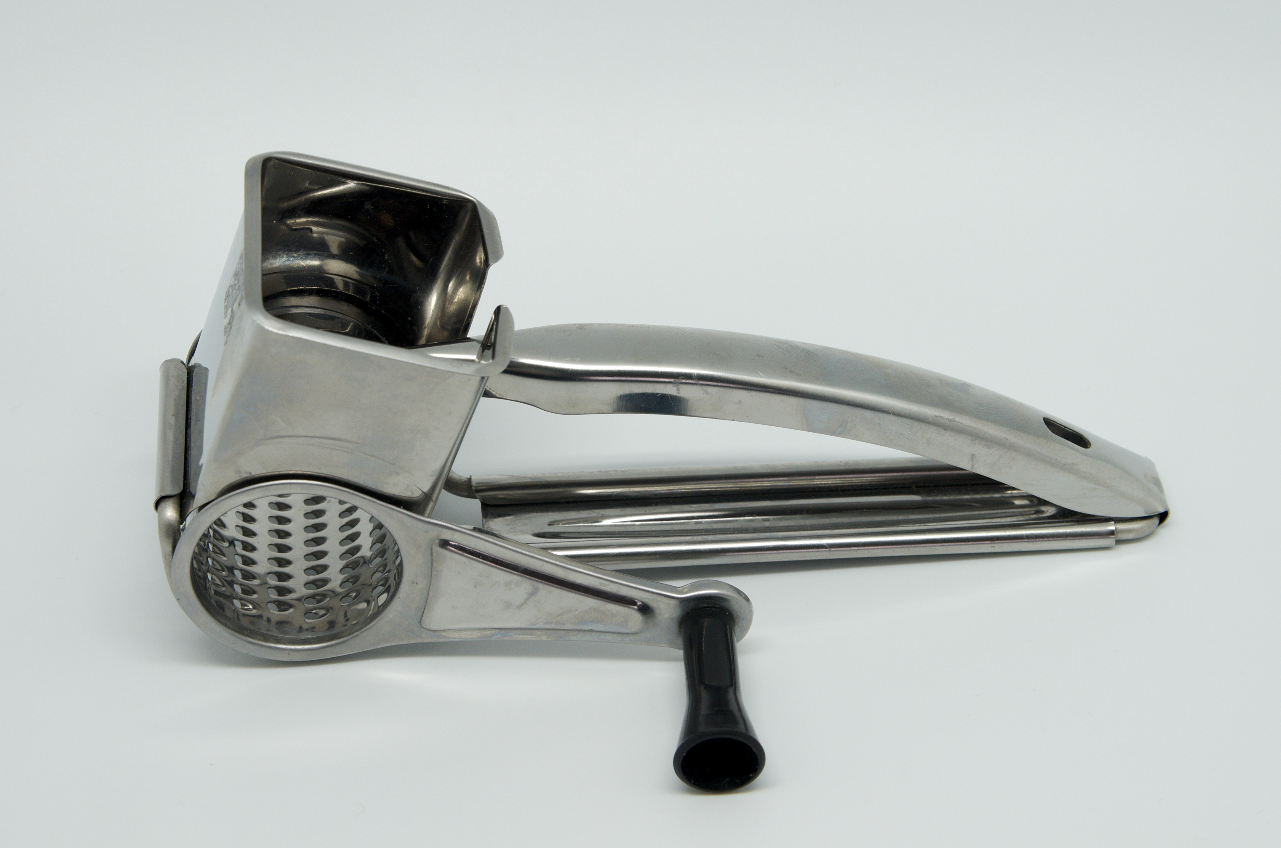 Râpe à fromage